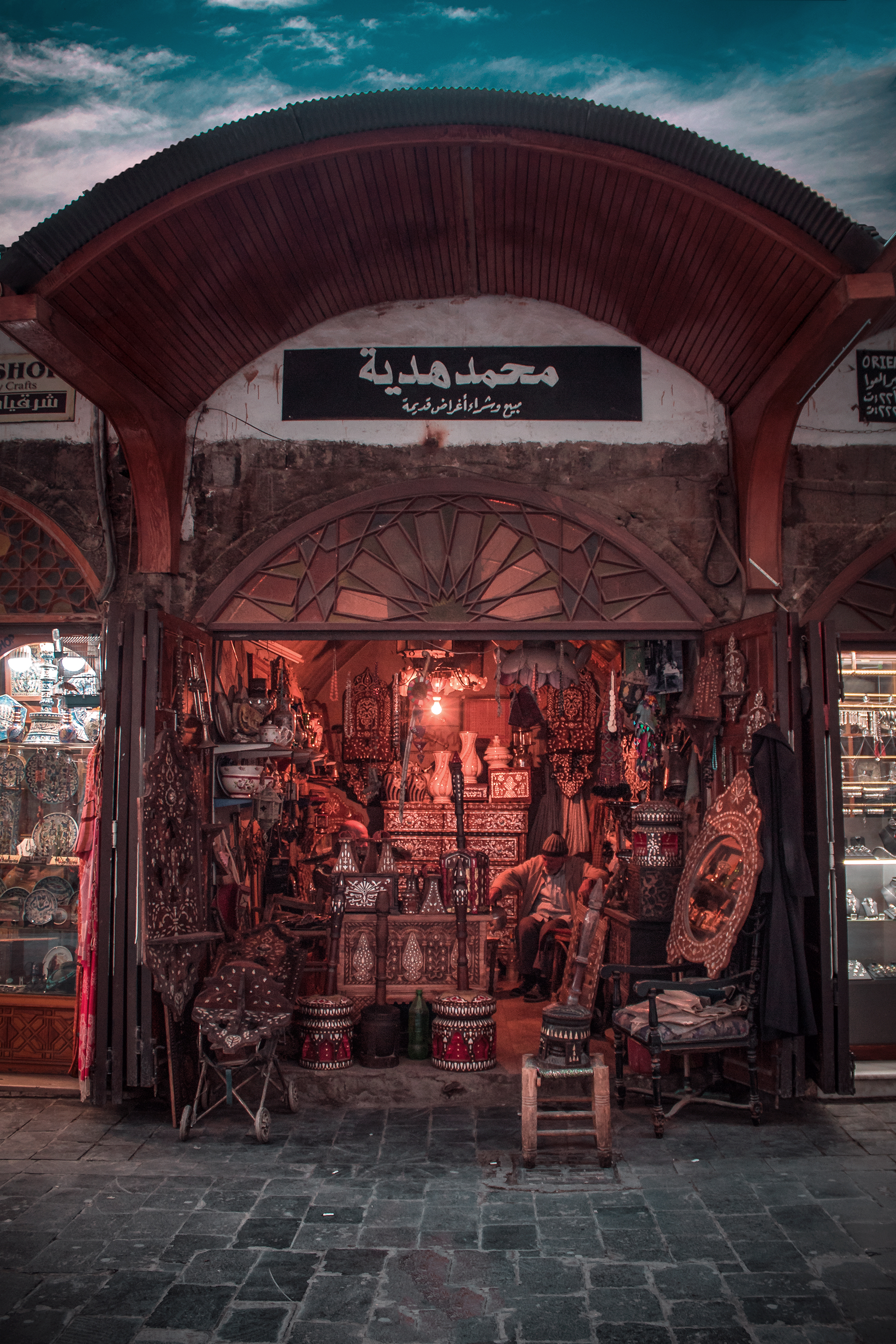 سوق القباقبية هو أحد أسواق مدينة دمشق يقع على إمتداد الجدار الجنوبي للجامع الأموي، تغير إختصاصه اليوم من صناعة وبيع القباقيب إلى النجارة العربي ومحال للصياغ والعاديات الأثرية